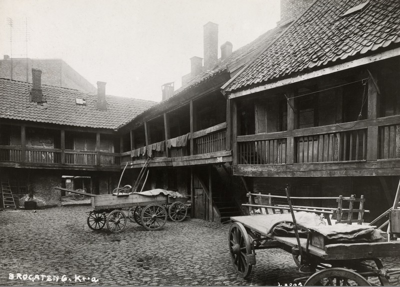 Brugata 6.